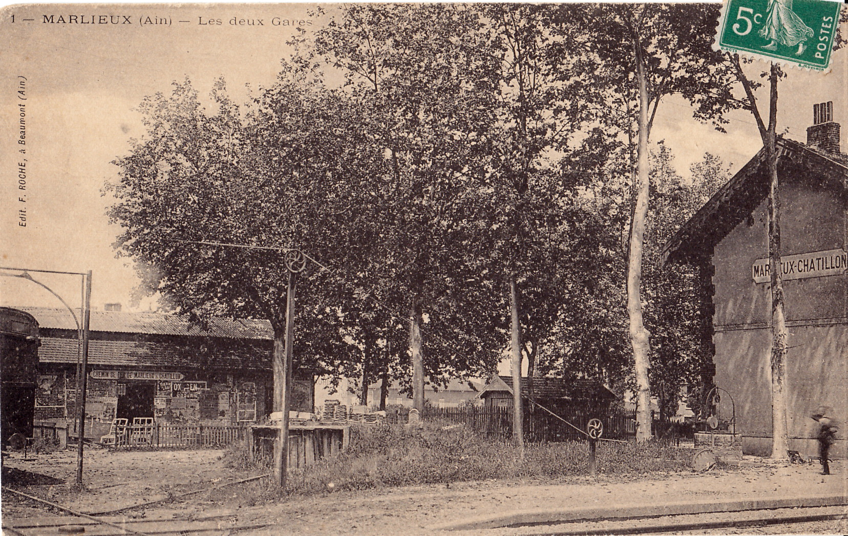 Carte postale ancienne éditée par F. Roche à Beaumont, n°1 : MARLIEUX - Les deux Gares